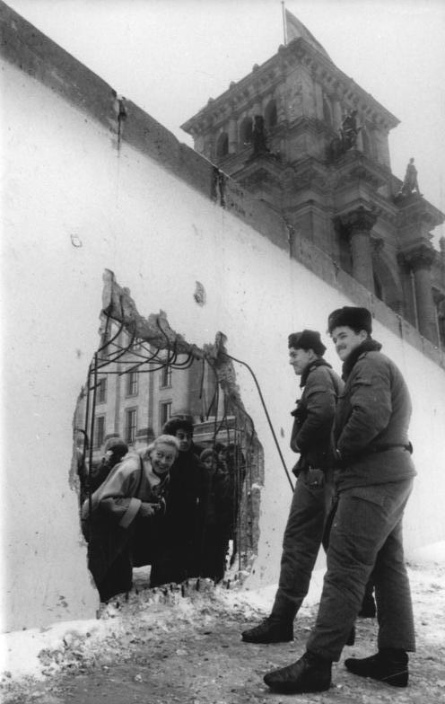 ADN-ZB Reiche 5.1.90 Berlin: Eine gute Durchsicht hat man zu beiden Seiten der Mauer am Brandenburger Tor, nachdem auch an dieser Stelle "Mauerspechte" am Werk waren.